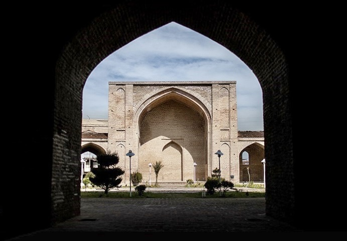 مازِرونی: فرح آباد ساری